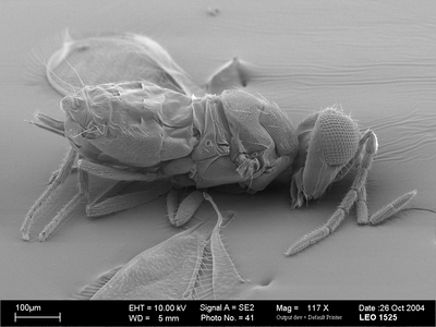 Imagen de microscopio electrónico de Encarsia formosa